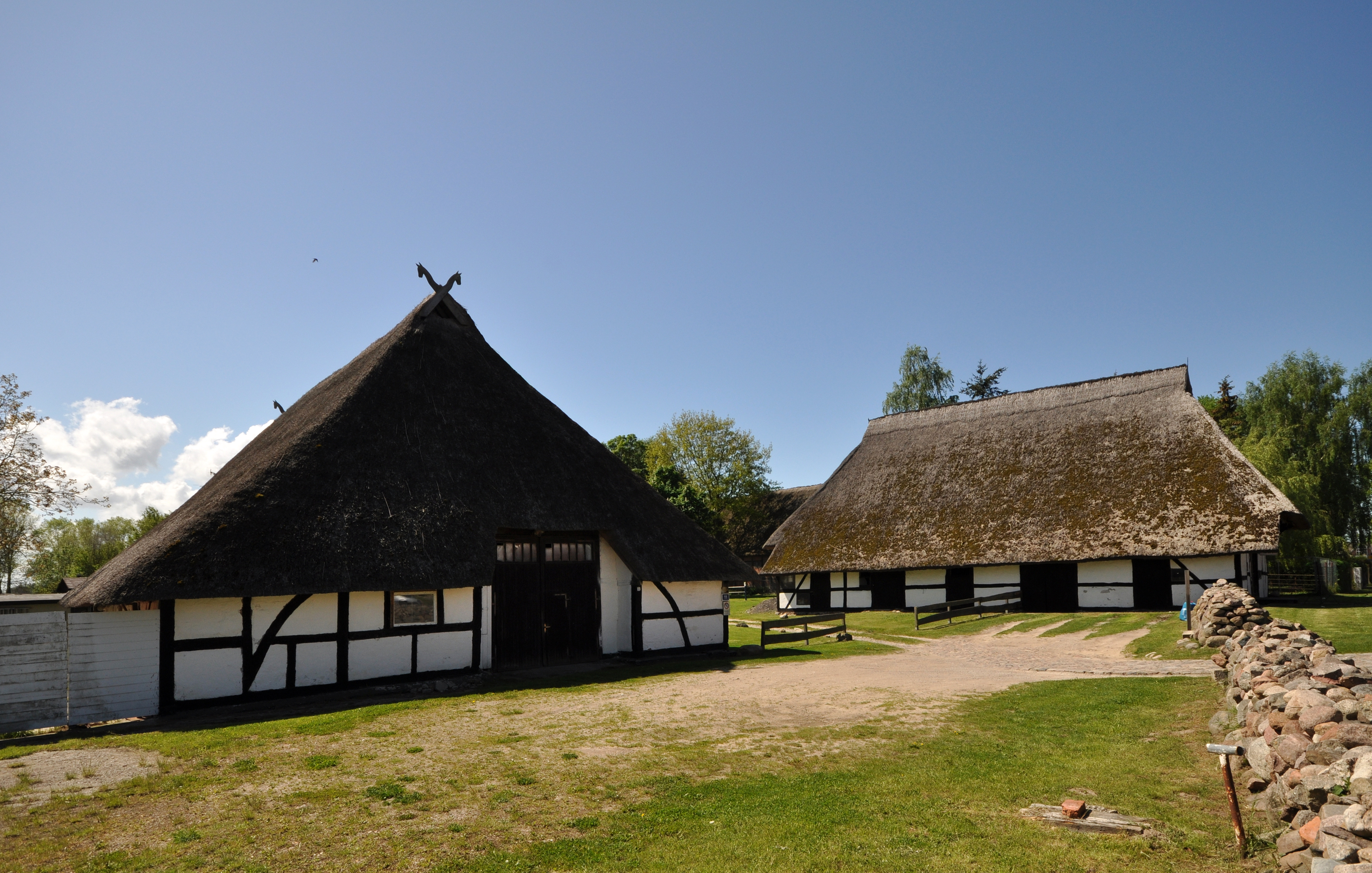 historic building in Lichtenhagen, Dorfstraße 11